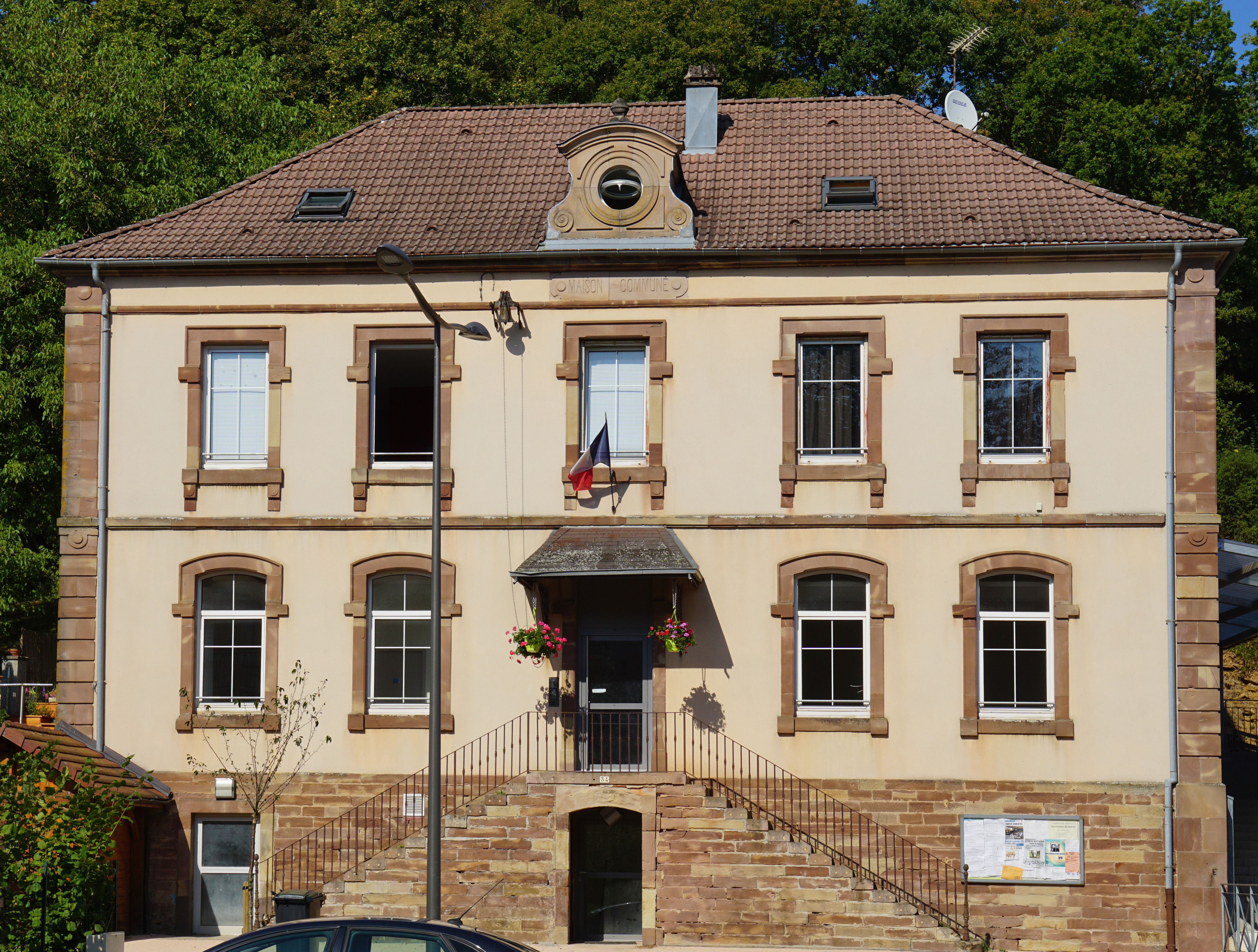 La mairie et la salle des fêtes de Trémoins.